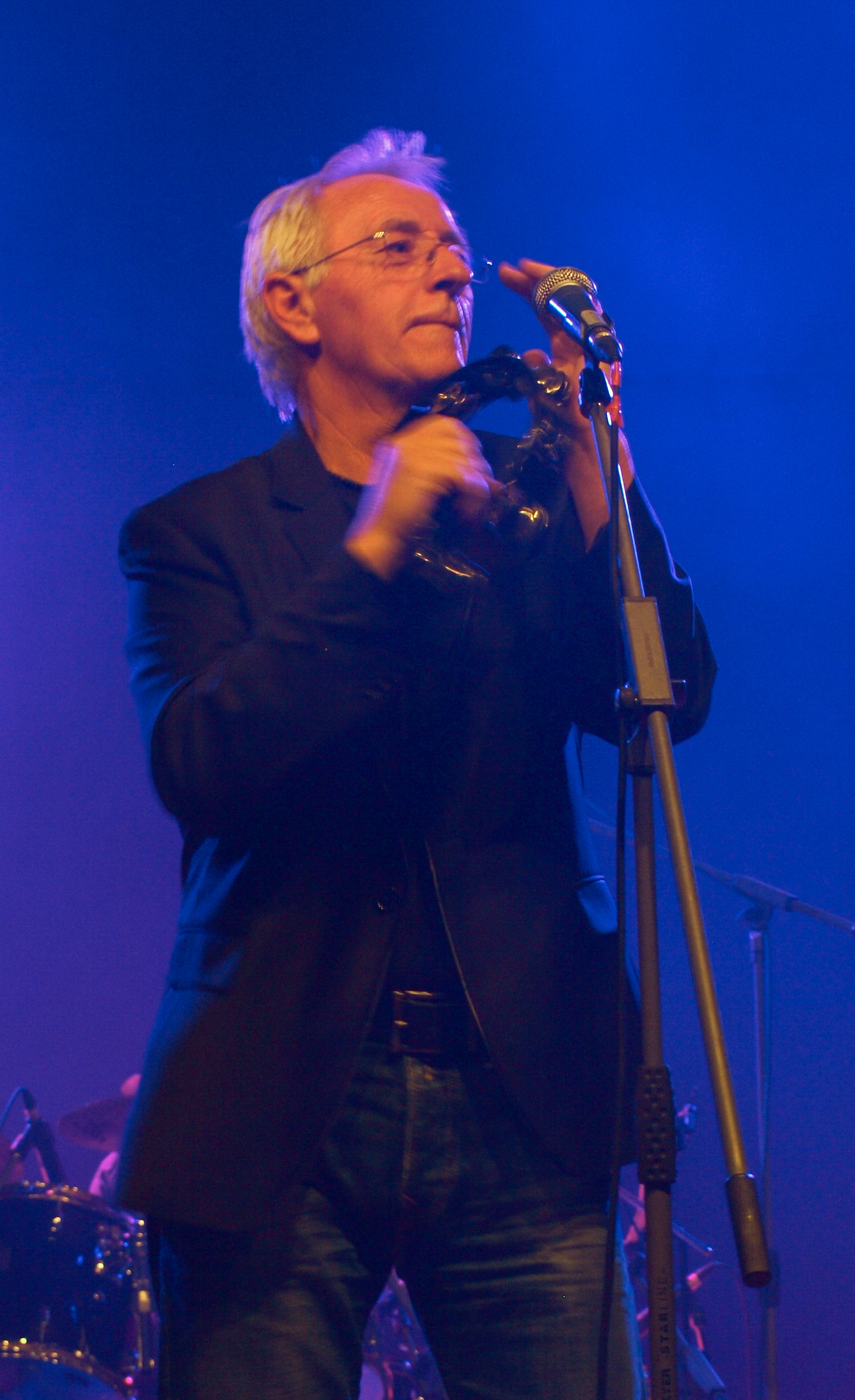 Nastup Olivera Dragojevića u Slavonskom Brodu, 10. prosinca 2010. godine.